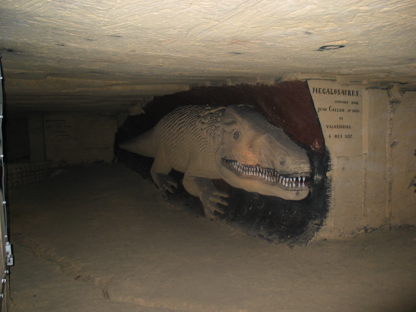 Megalosaurus in Mergelgroeve / Gemeentegrot Valkenburg